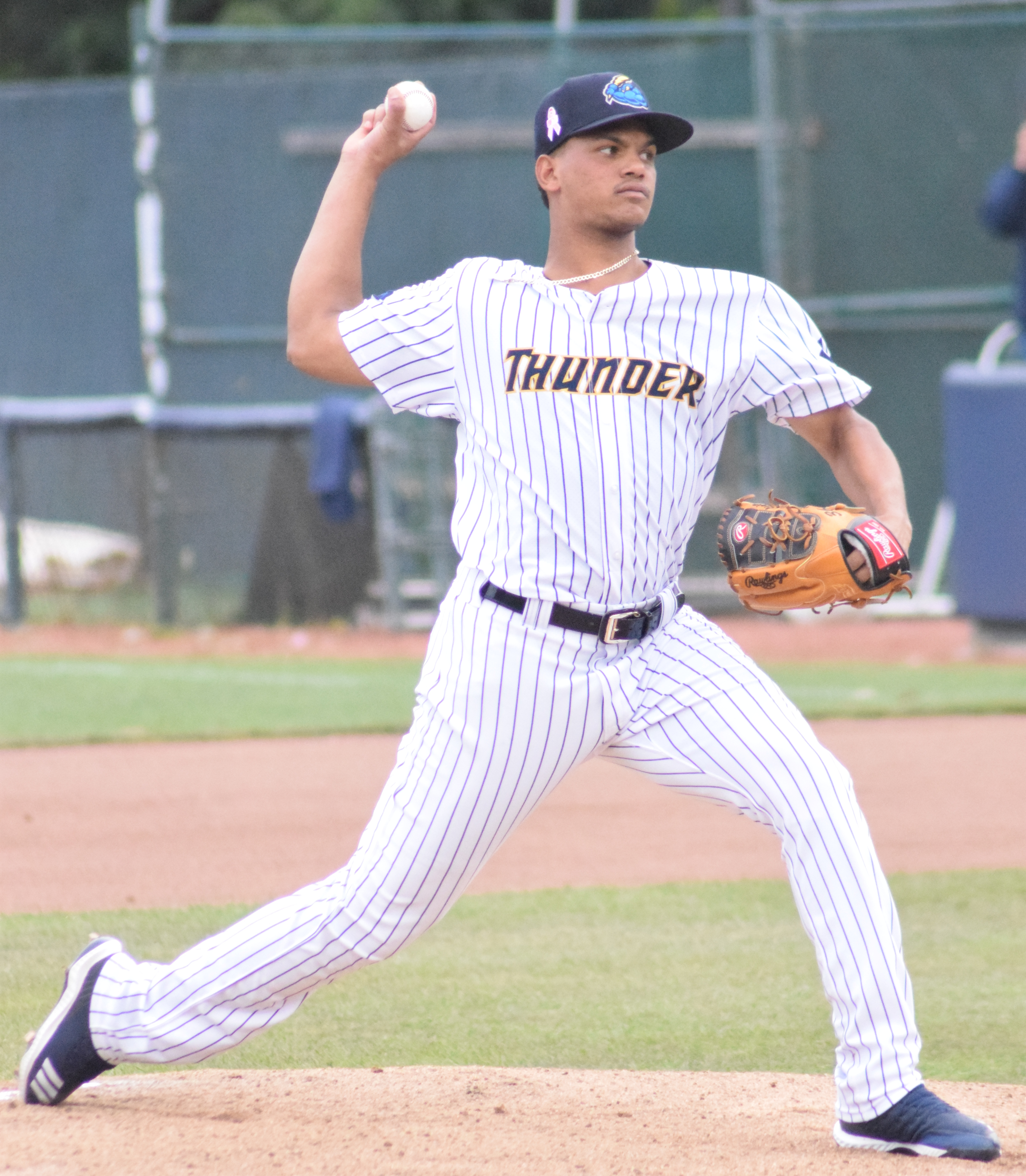 Albert Abreu